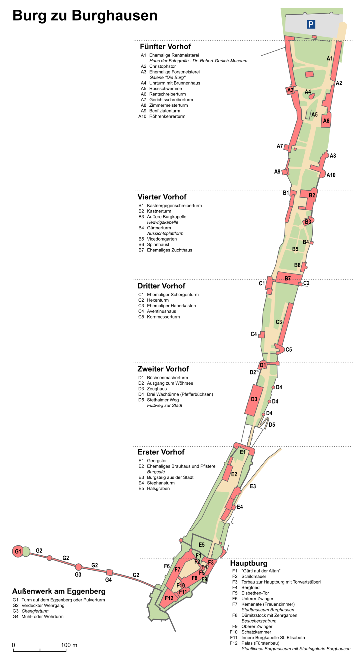 Übersichtskarte der Burg zu Burghausen